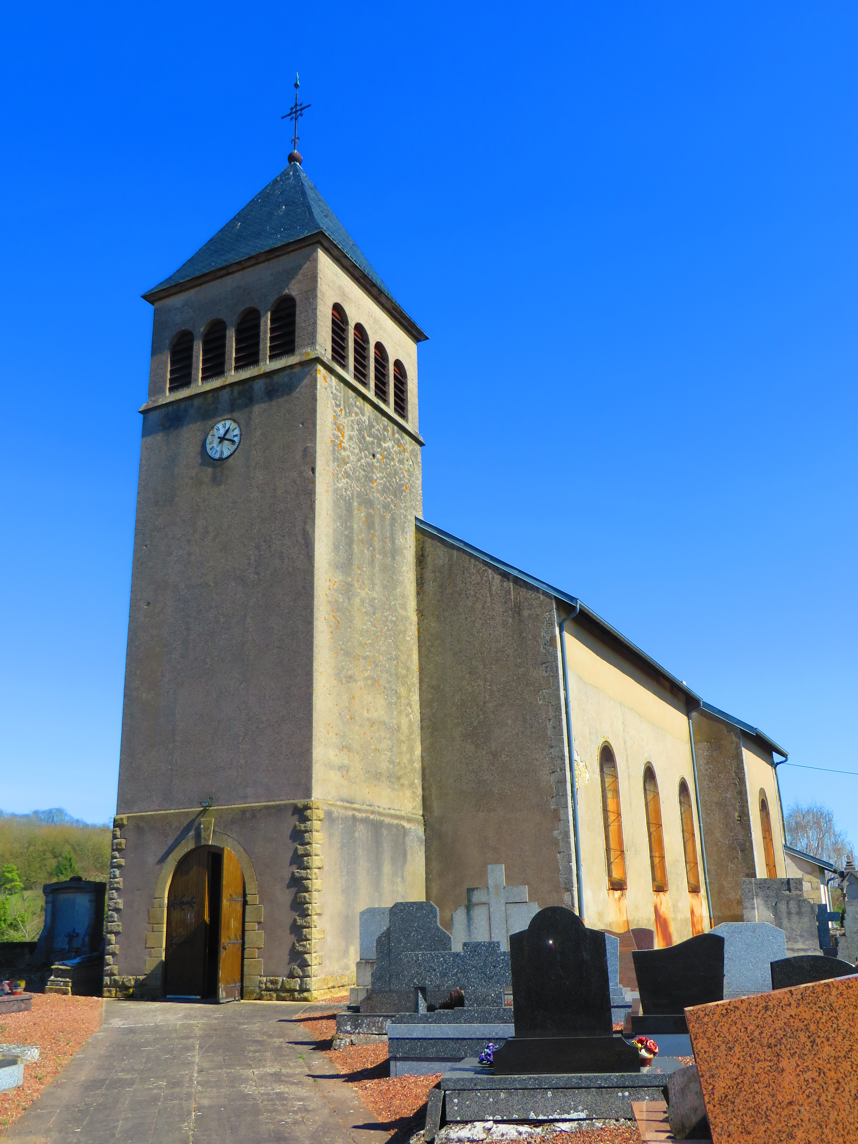 Thicourt Église Saint-Denis